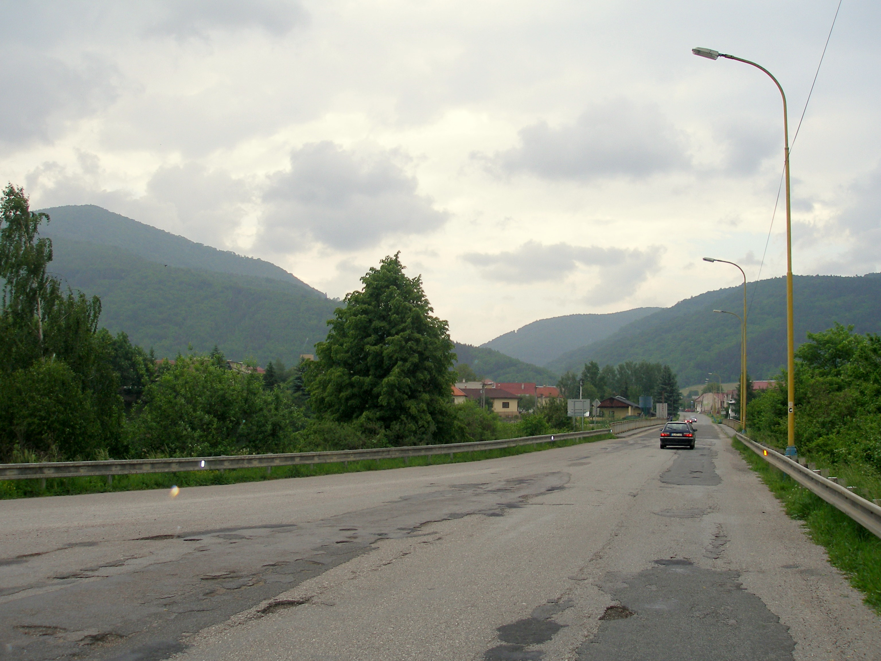 Obec Margecany okres Gelnica región Spiš.